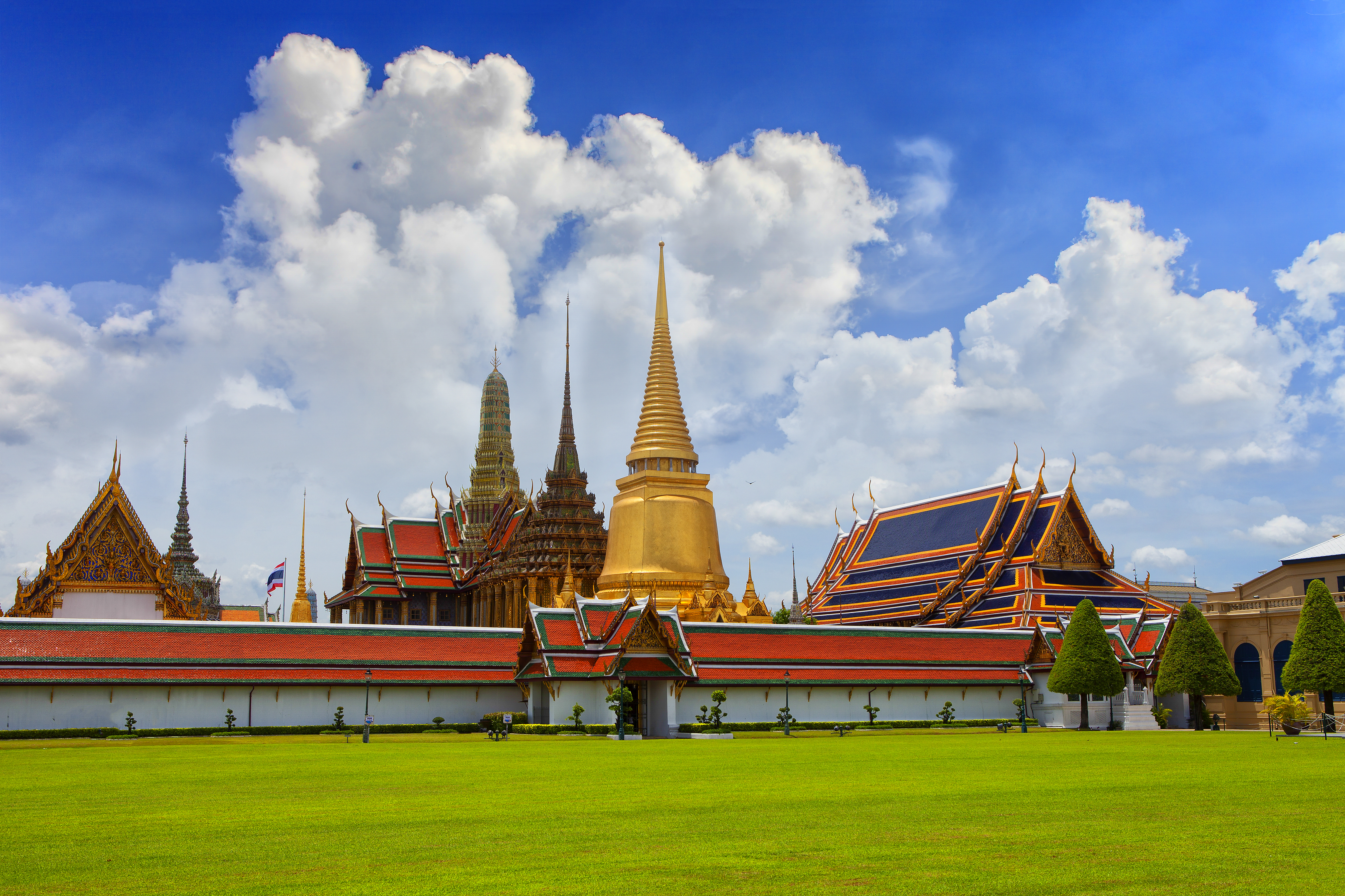 พระบรมมหาราชวังและวัดพระศรีรัตนศาสดาราม